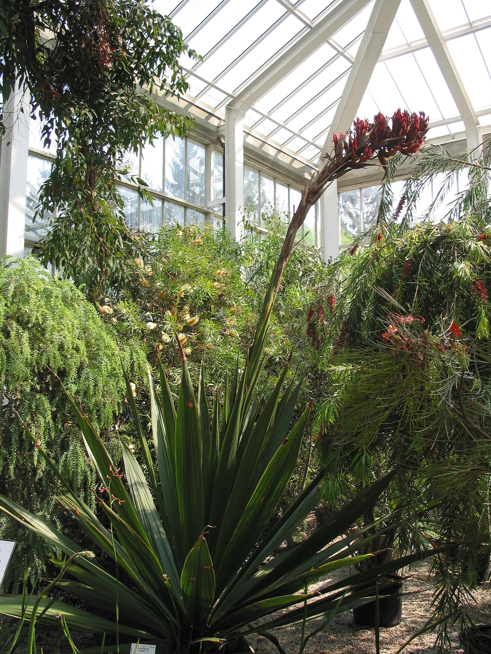 Lis javelot du Queensland (Doryanthes palmeri).